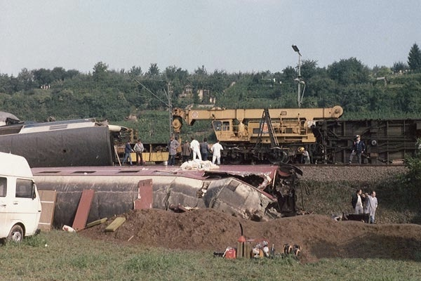 Unfallstelle des Eisenbahnunfalls bei Heilbronn-Klingenberg am 12. August 1984